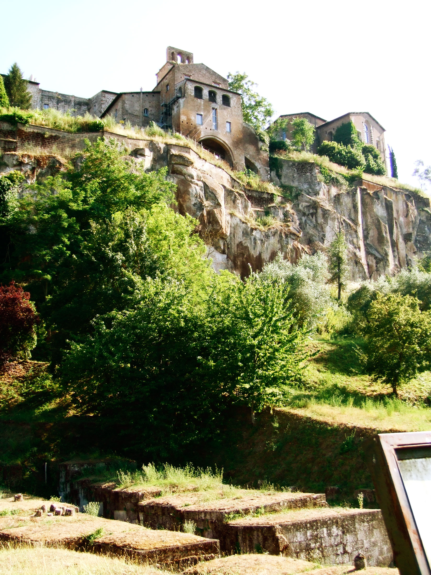 Nécropole d'Orvieto - Tombes a dado du site du Crocifisso del Tufo